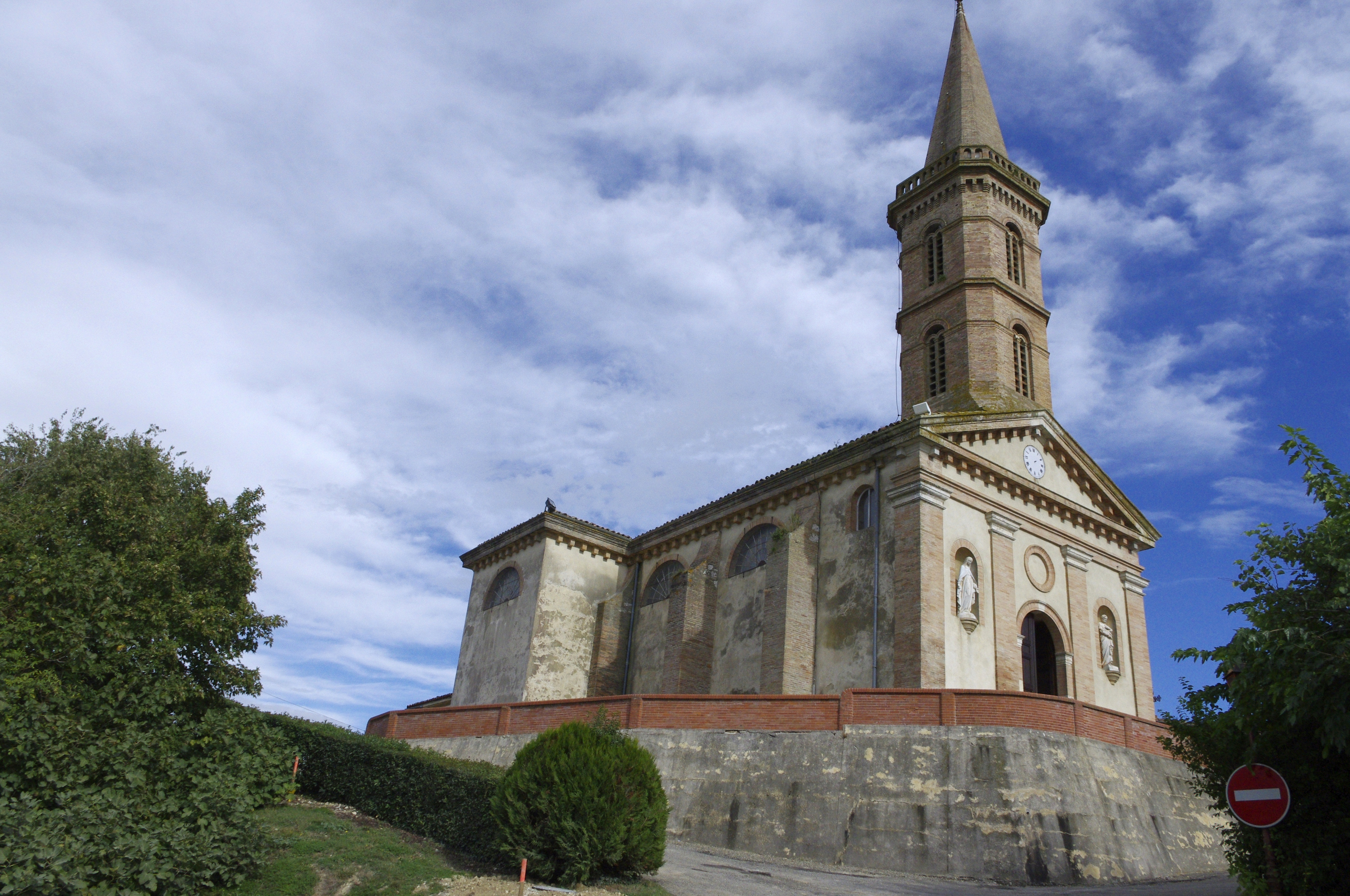 Église de Brignemont, Haute Garonne, France.